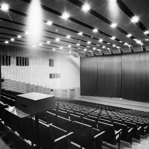 Интерьер зрительного зал Дворца Молодежи в Новополоцке реализован по проекту Карако В.И.